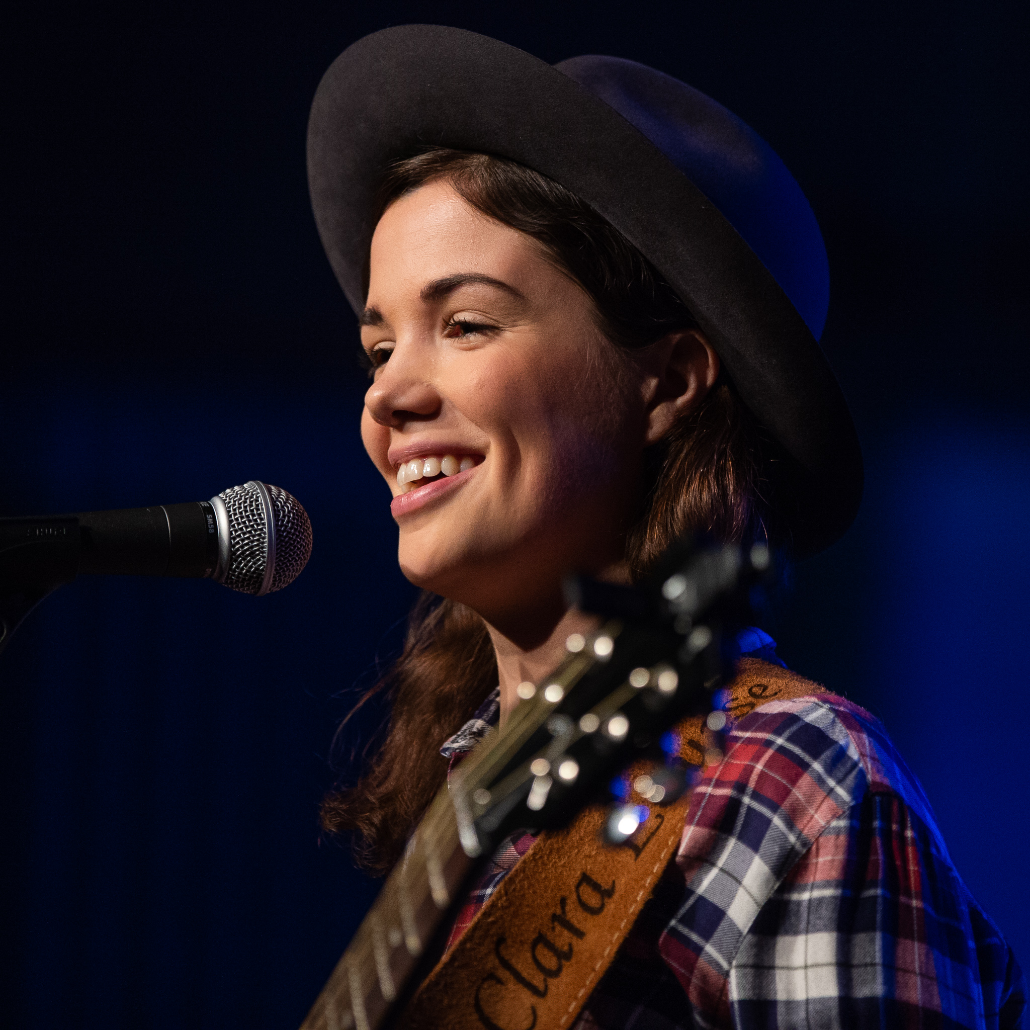 Clara Louise,Concertbüro Franken,Konzert,Livekonzert,Livemusik,Markgrafensaal,Musik